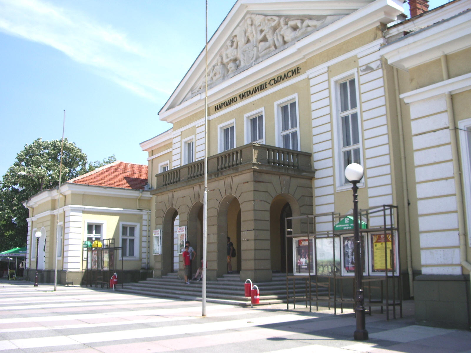 Читалище "Съгласие", където се помещава и драматичен театър „Невена Коканова”, Ямбол. Автор: Емил Манчев